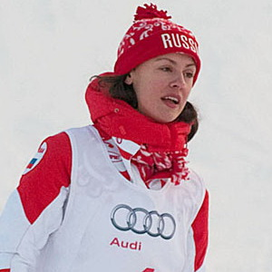 Ольга Дыховичная на четвёртом Кубке Audi по слалому среди звёзд